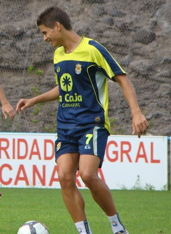 Francis Suárez